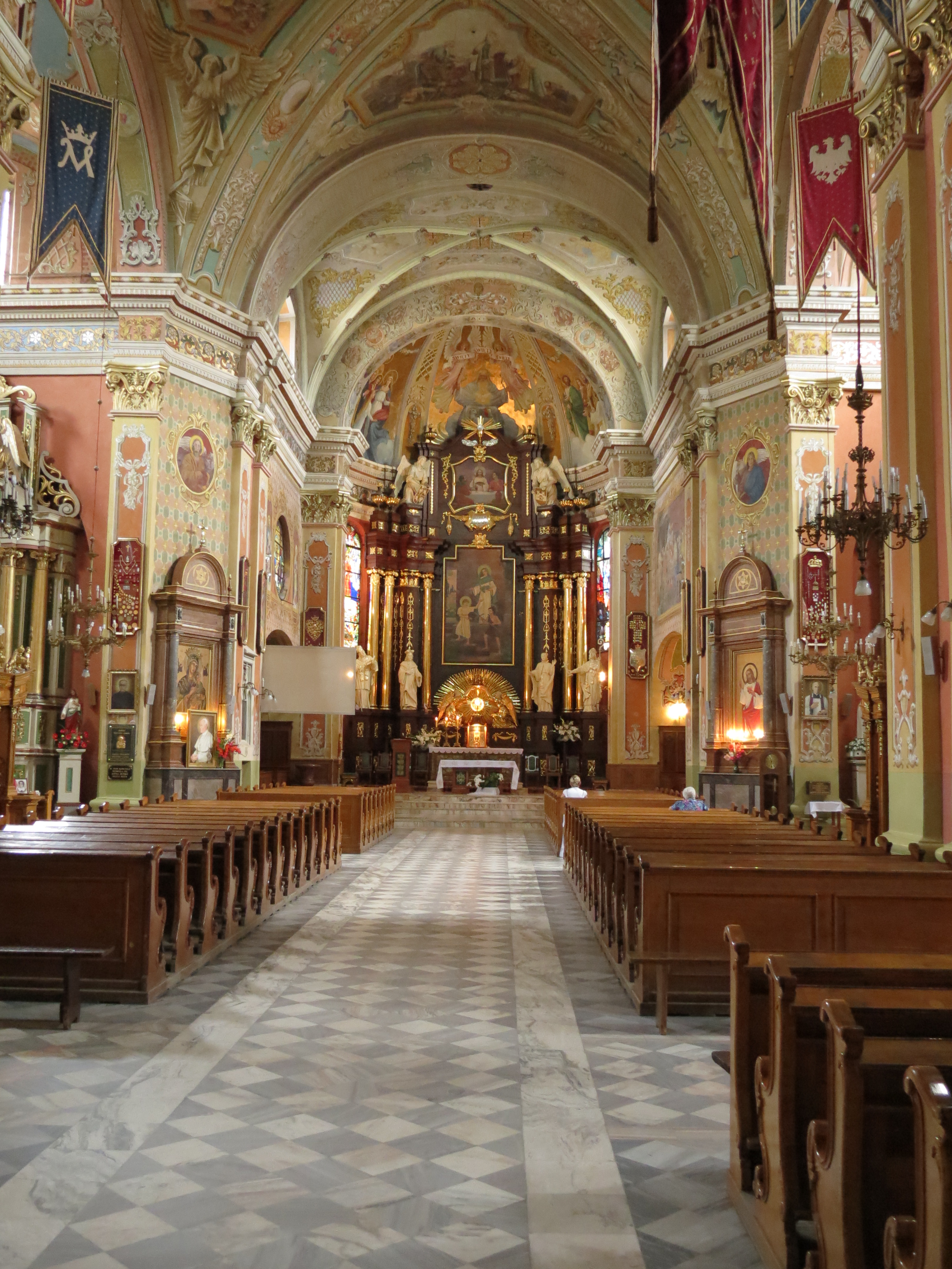 Jarosław, kościół p.w. św. Jana Chrzciciela, ob. par. p.w. Bożego Ciała, 1572, XVIII, 1890